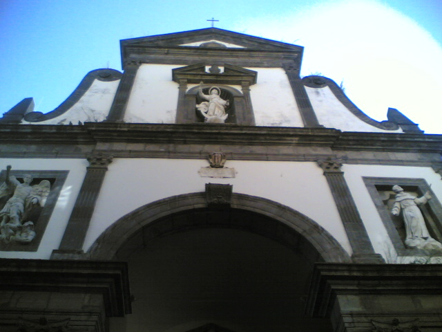 Facciata della Chiesa Gesù delle Monache (Napoli)